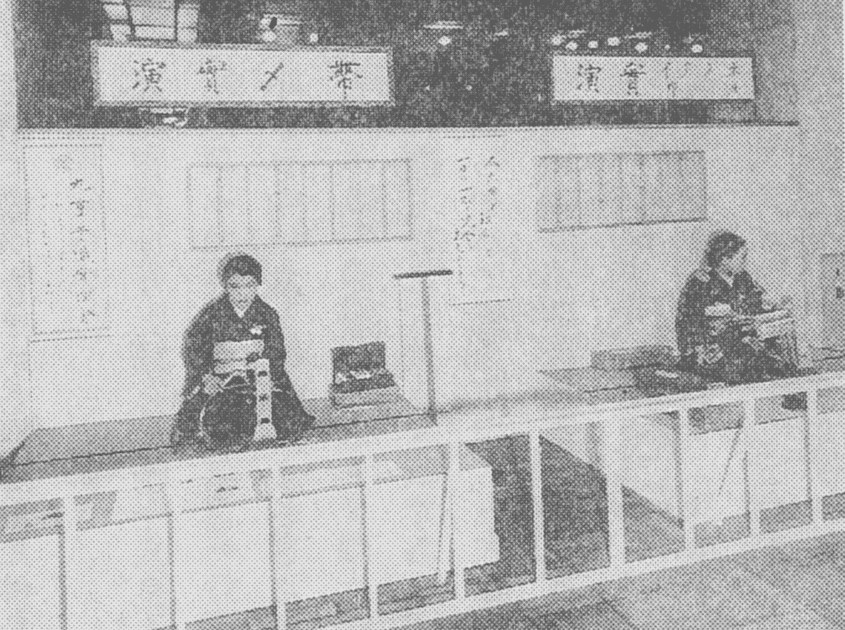 Kokonoe Toshiko (Japanese, *1904, †2002)